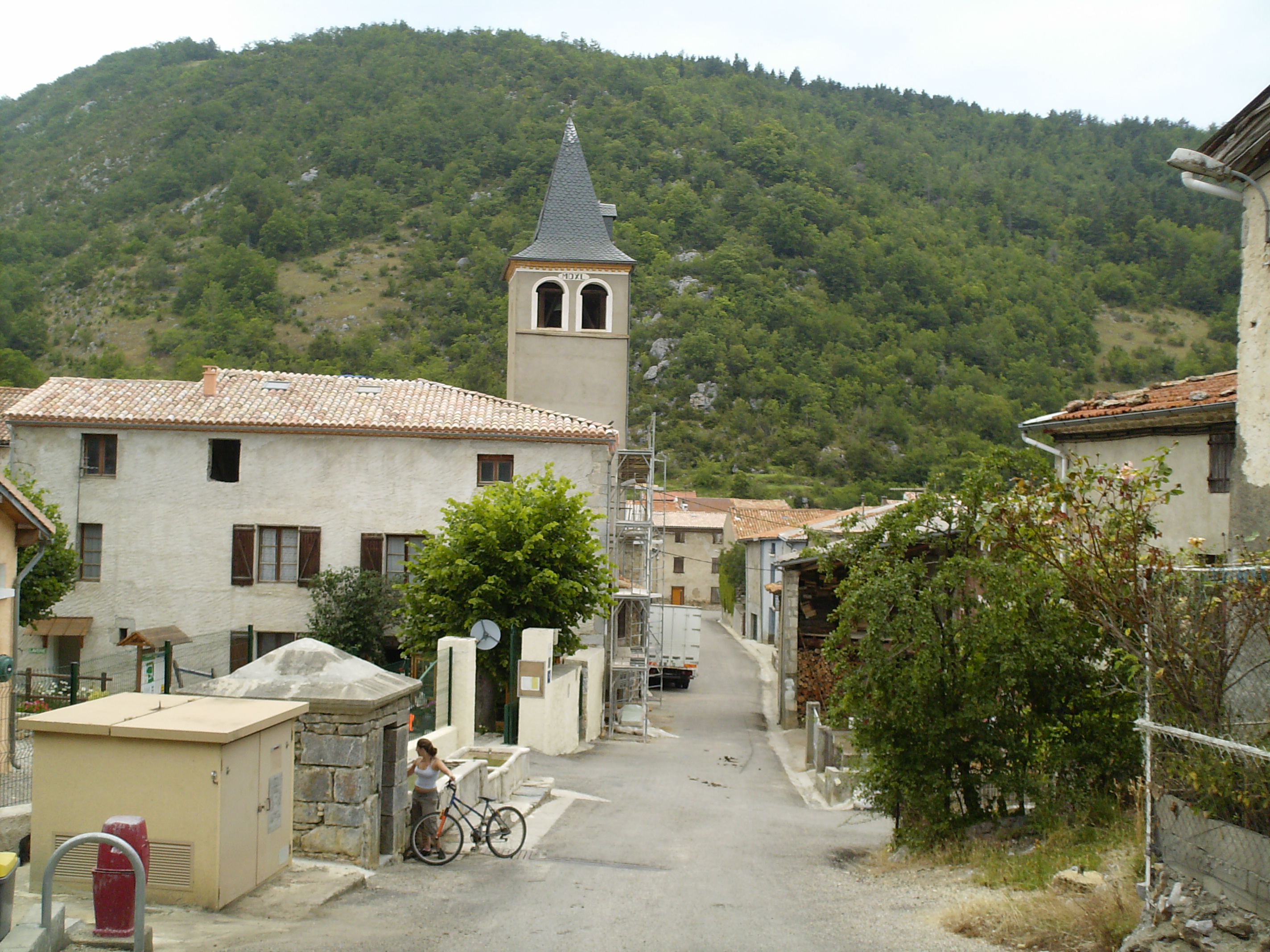 L'église du village de Roquefeuil dans l'Aude